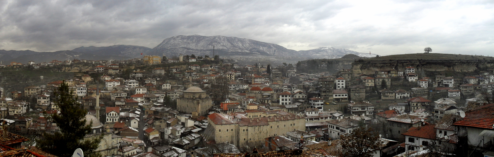 Safranbolu Panaroma